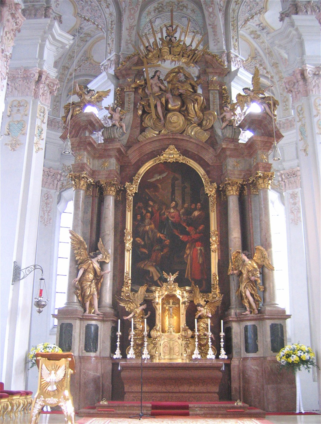 Heilig-Geist-Kirche, München, Hochaltar